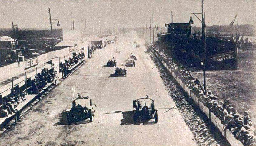 Départ des 24 Heures du Mans 1924 - 2.